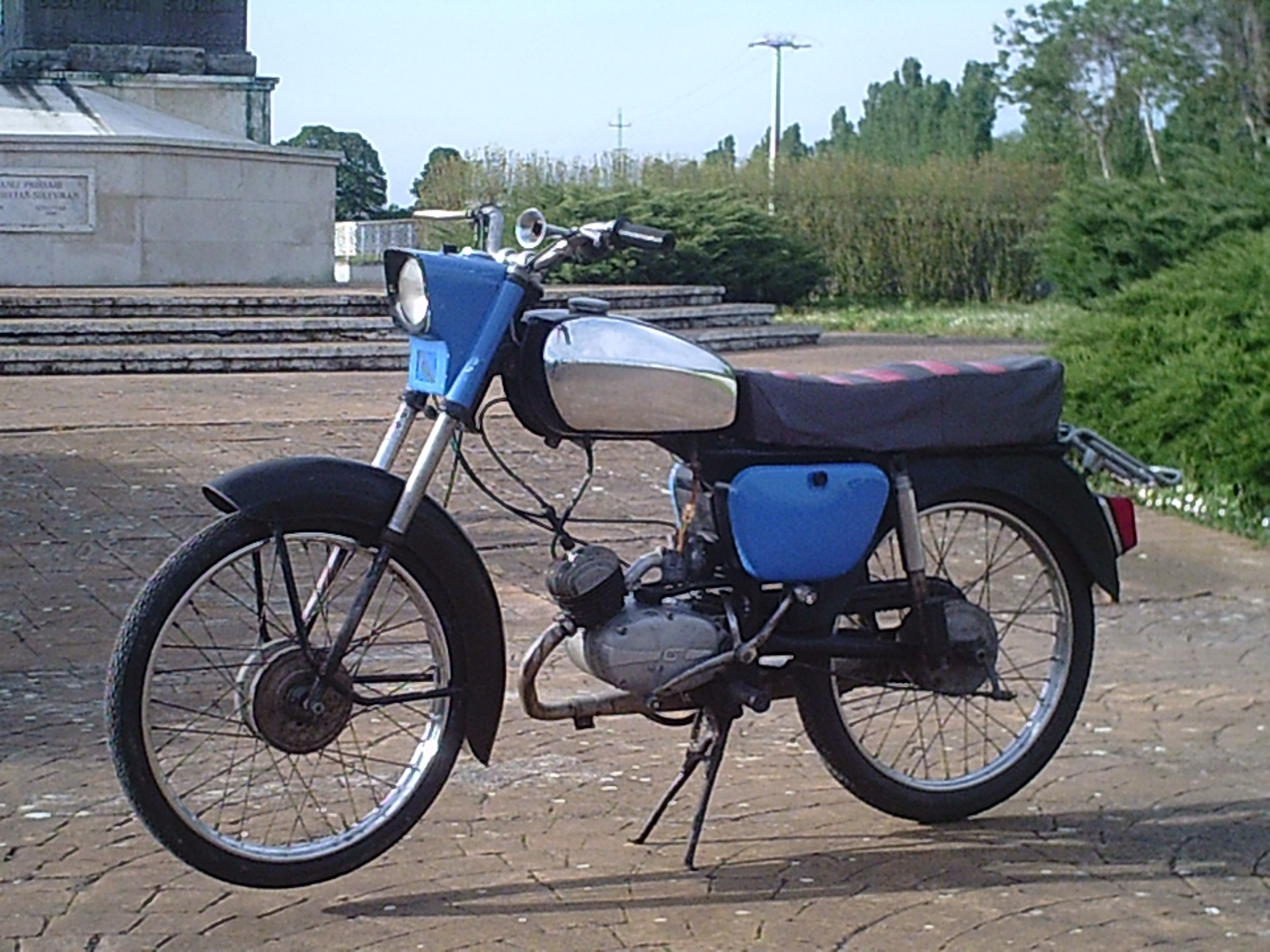 Balkan MK50-3Typ Szigetváron